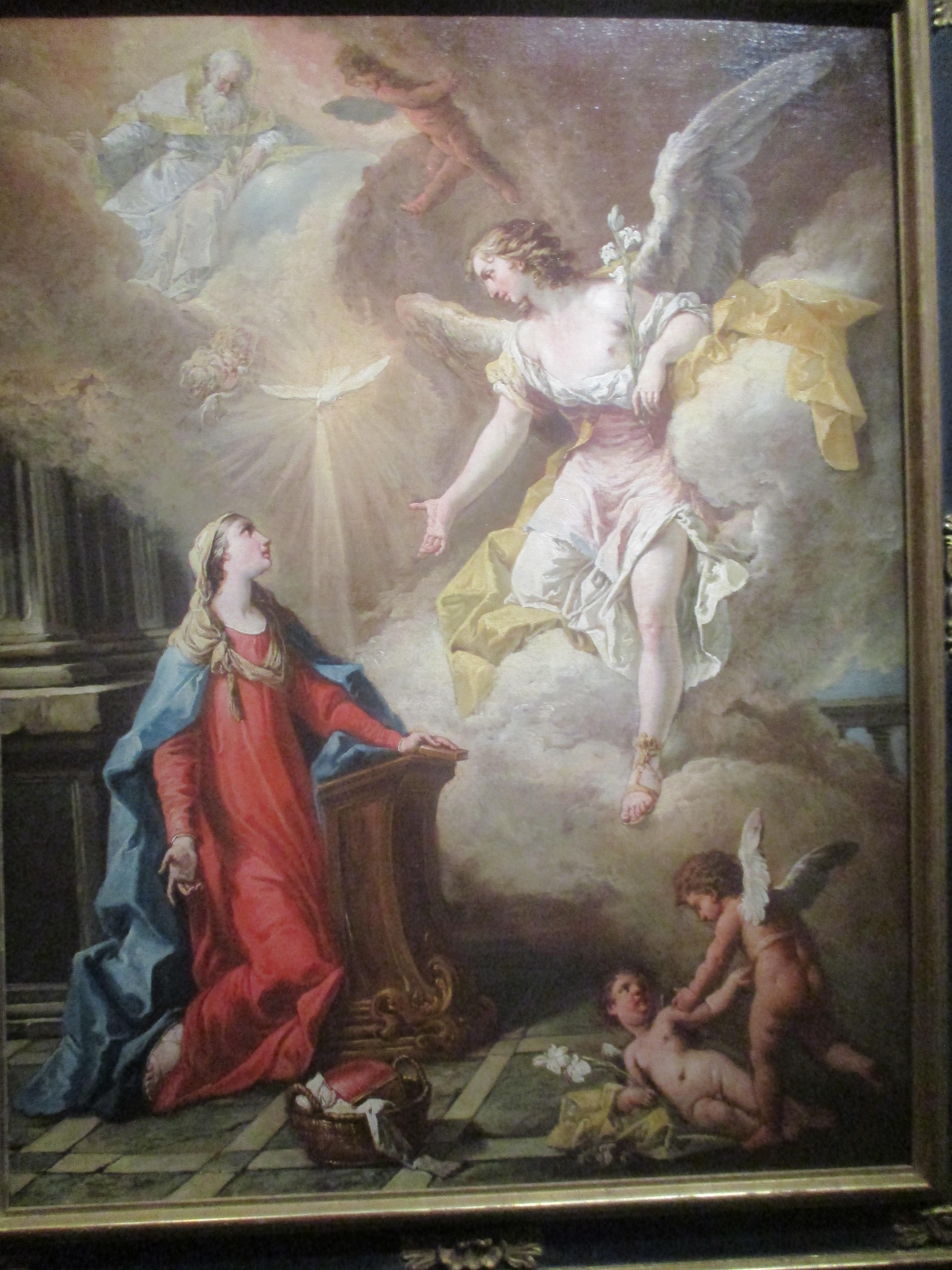 Annonciation de Gaspare Diziani, museo civico de Belluno, collection du palazzo Fulcis.